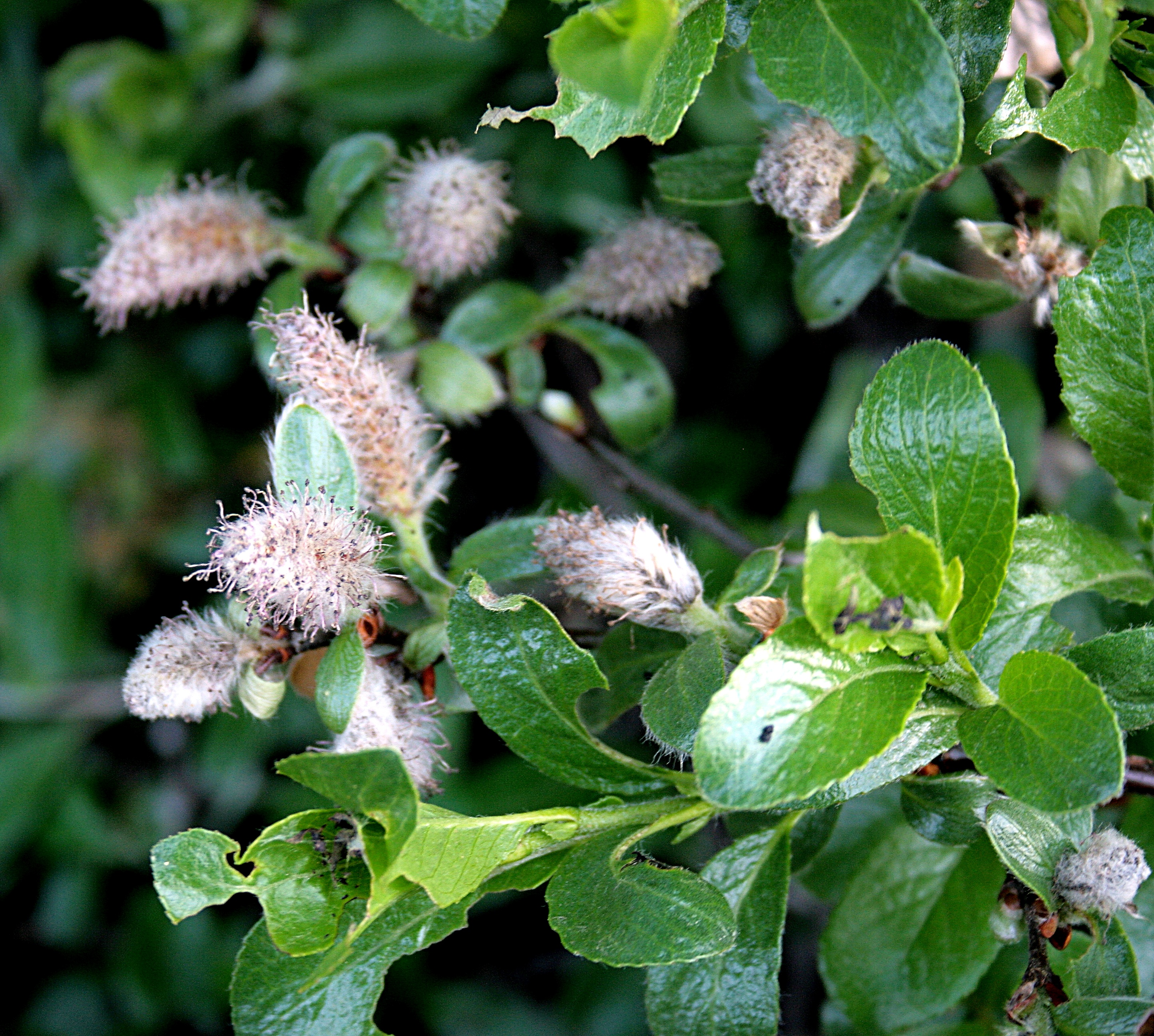 Ísland, Akureyri Botanical Gardens: Seidenhaarige_Weide_(Salix_glauca)